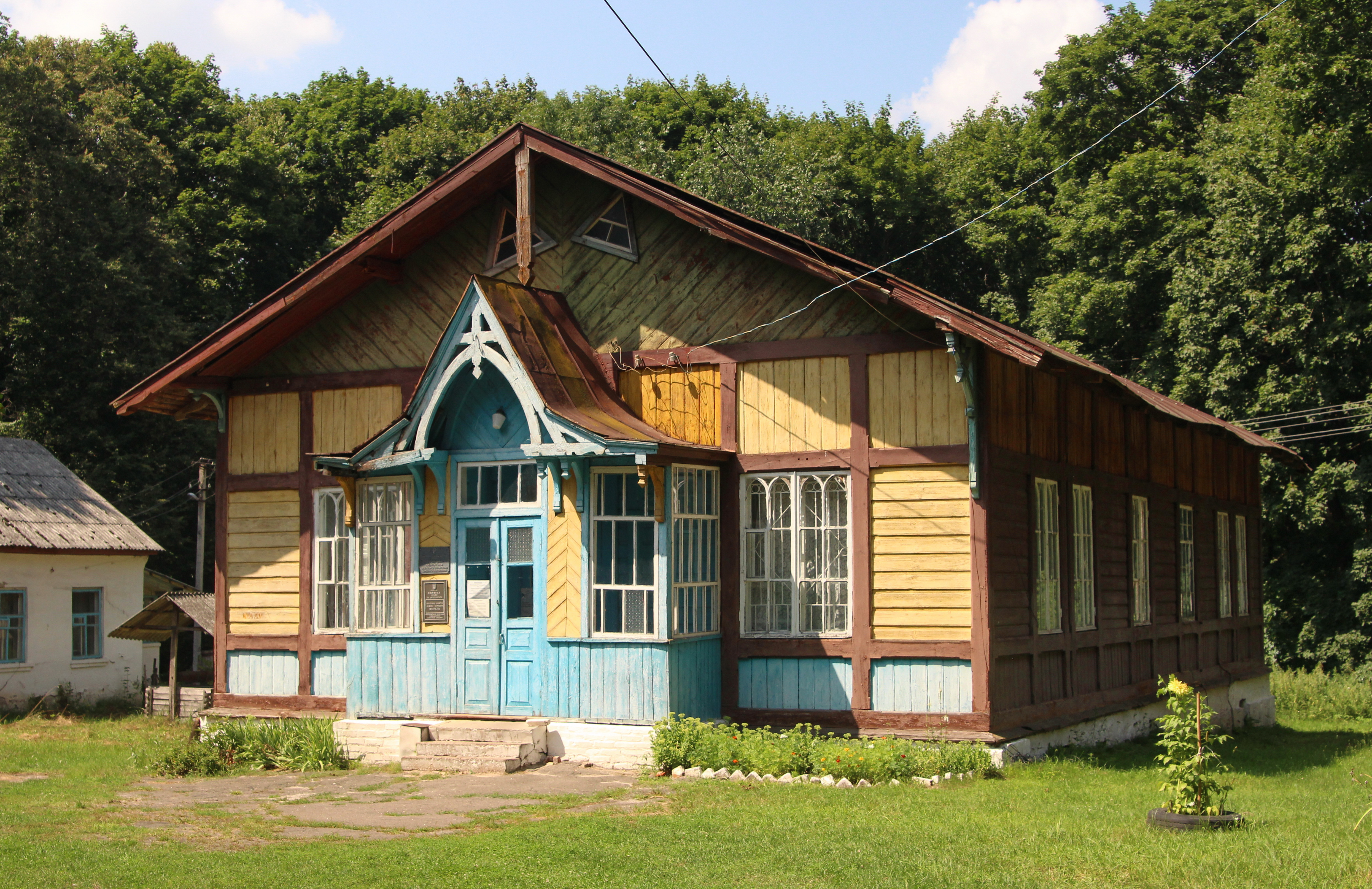 Комплекс споруд садиби Кочубеїв, село Дубовичі, в центральній частині села